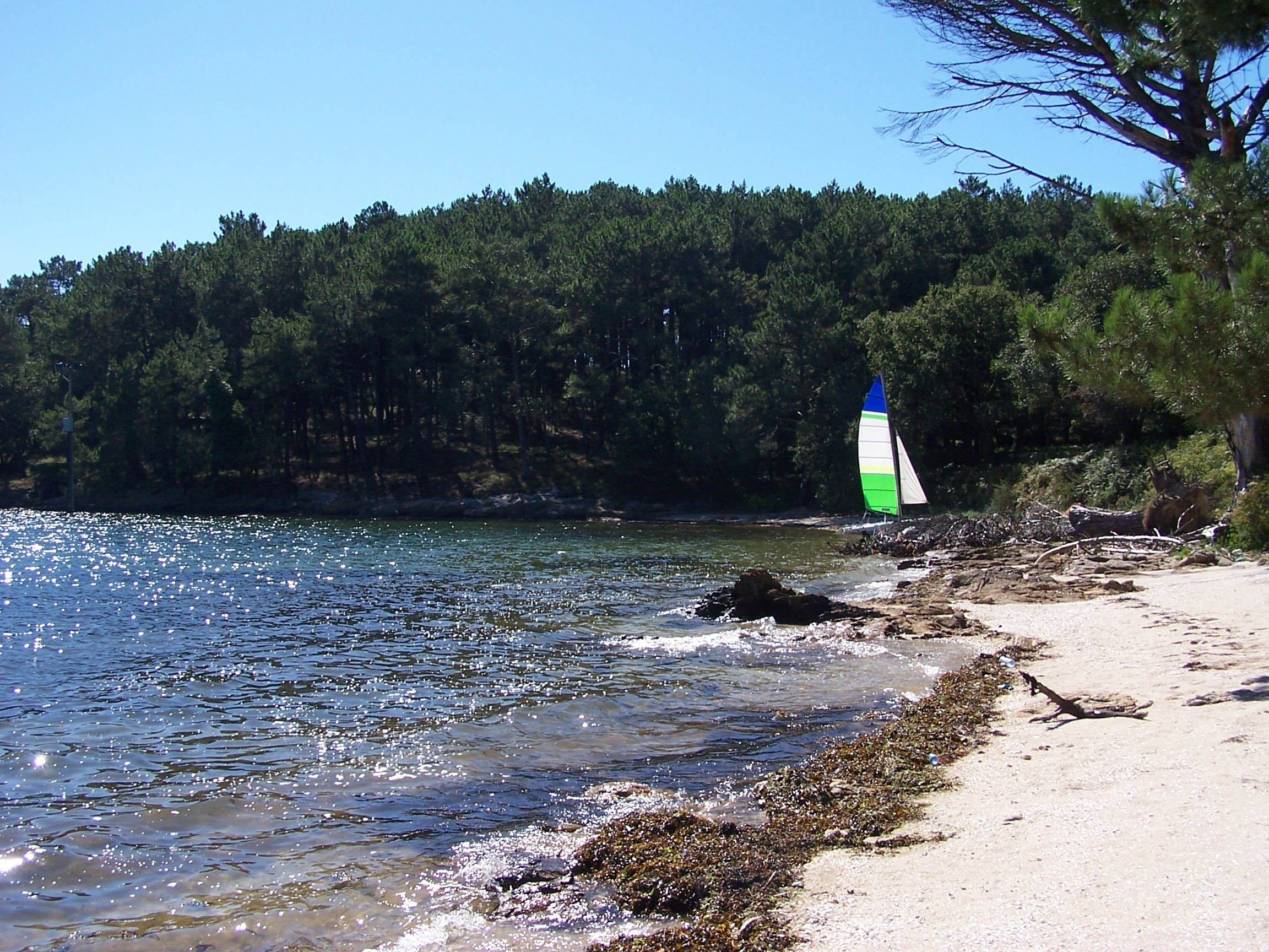 Carril, Isla de Cortegada, playa